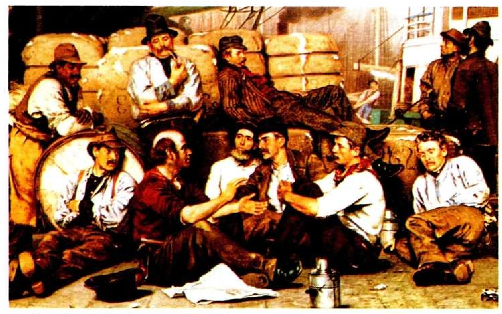 john George Brown: Zamaketarien eguerdia.